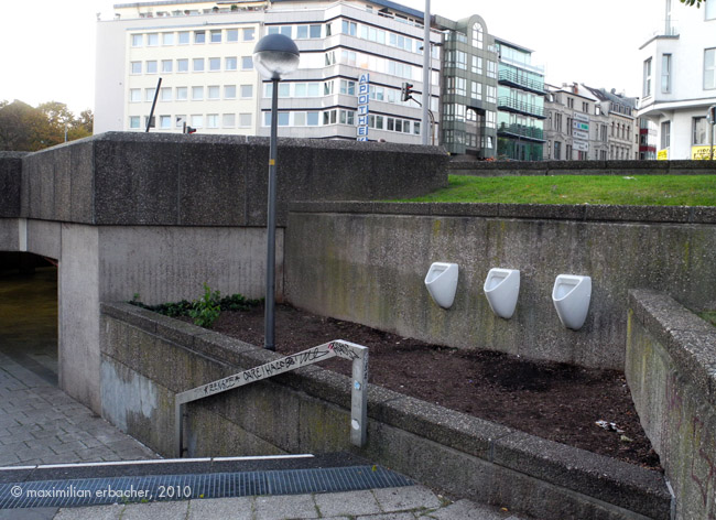 Maximilian Erbacher, URINAL, 2010 3 porcelain urinals, dimension variable